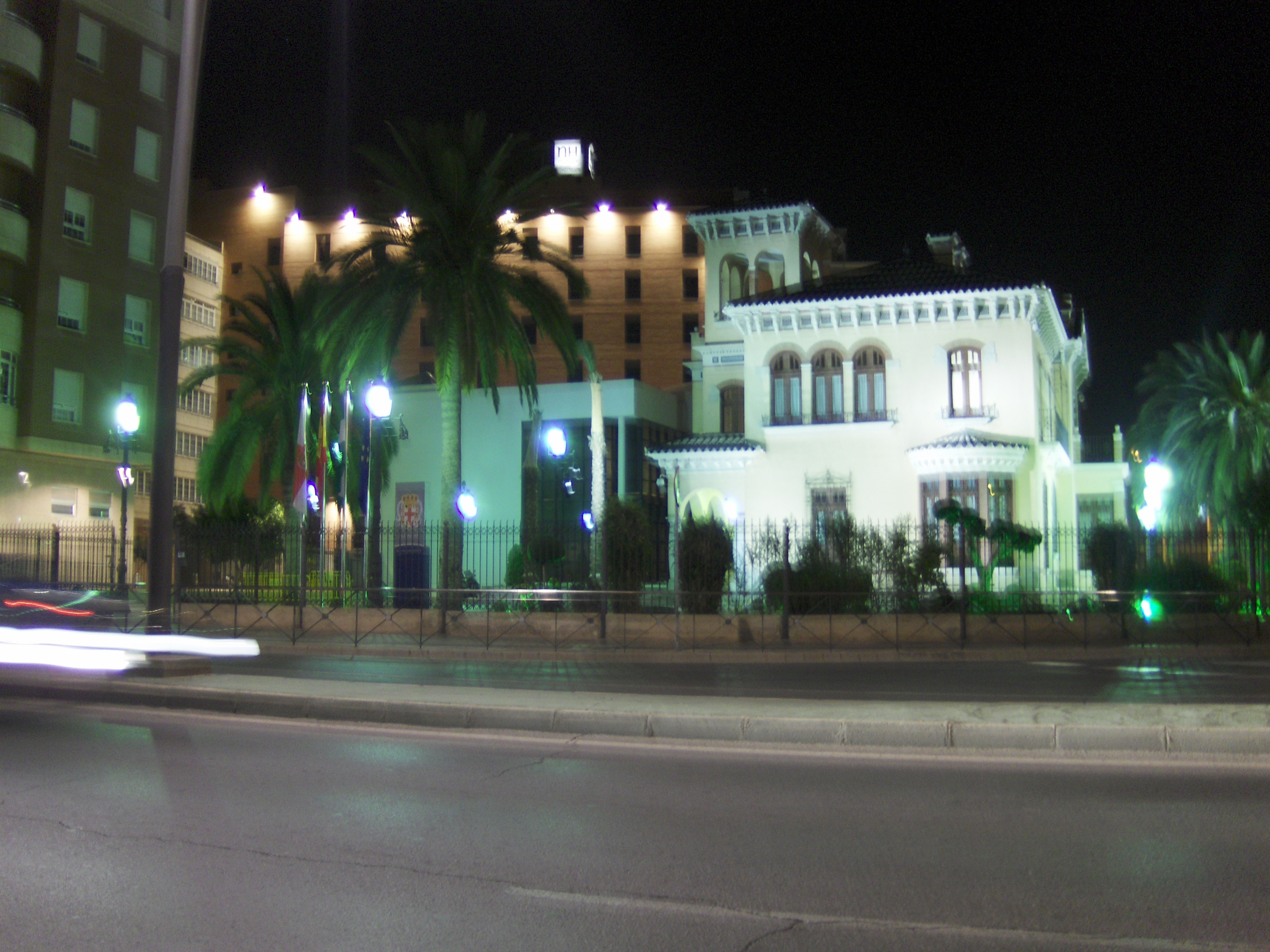 Preventorio de Almería; actual localización del ayuntamiento